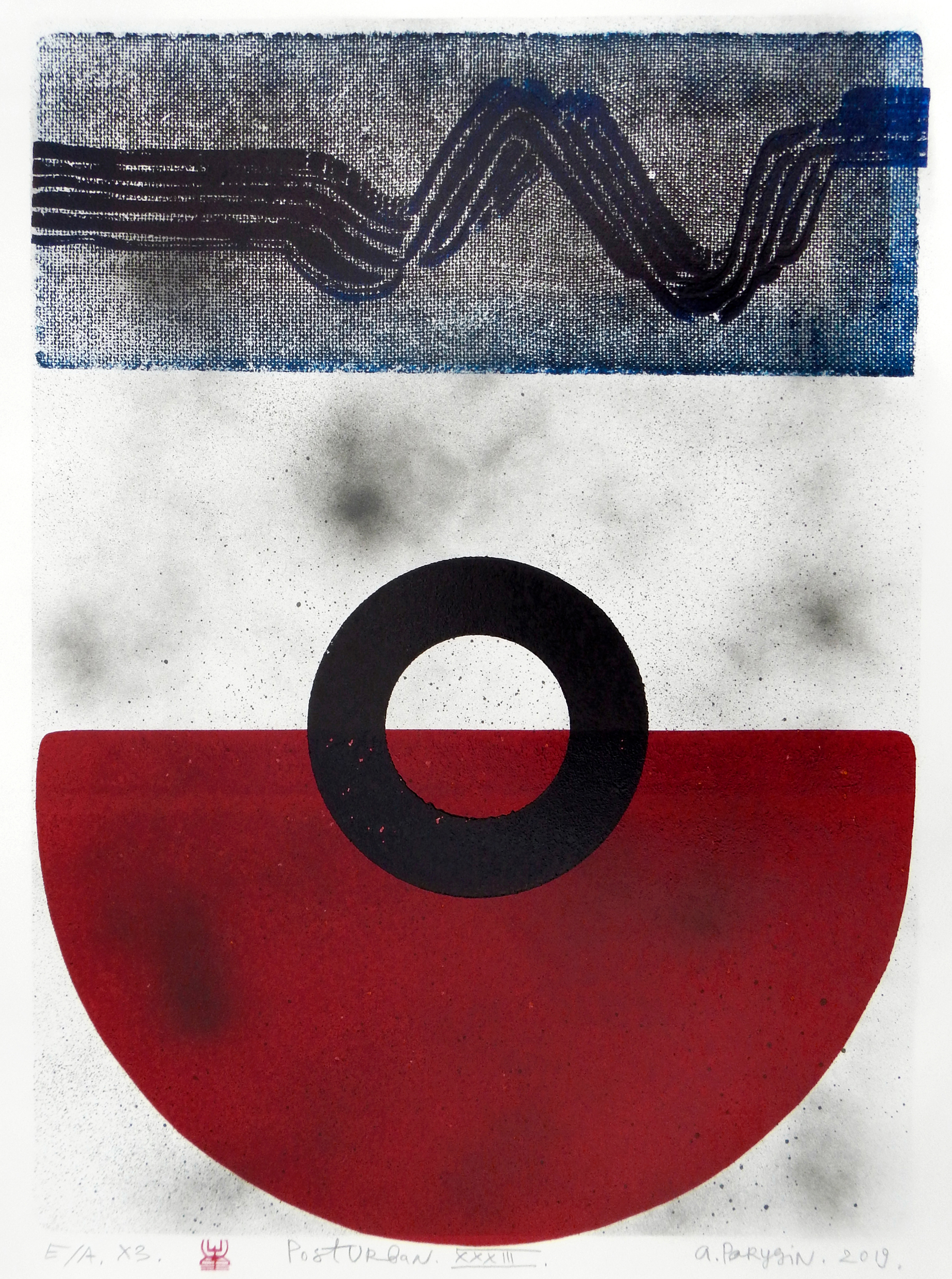 Гравюра